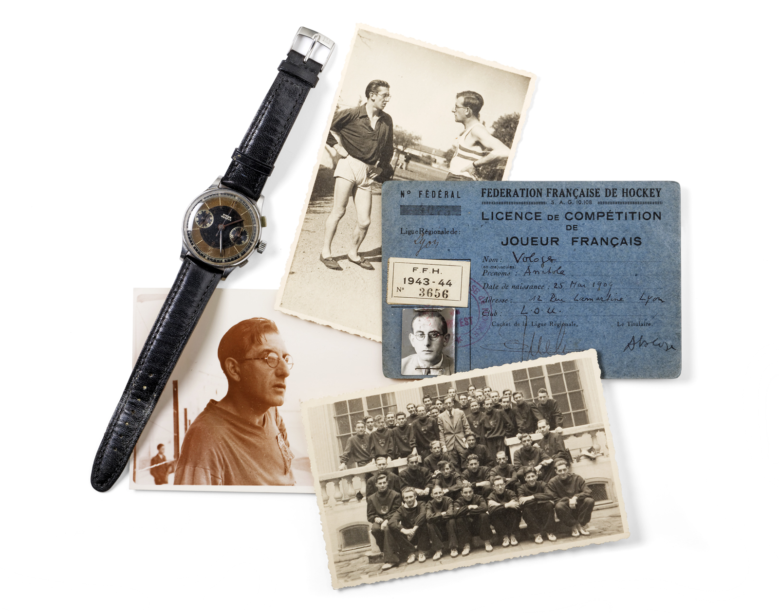 Montre, photos, carte d’identité de Tola Vologe.